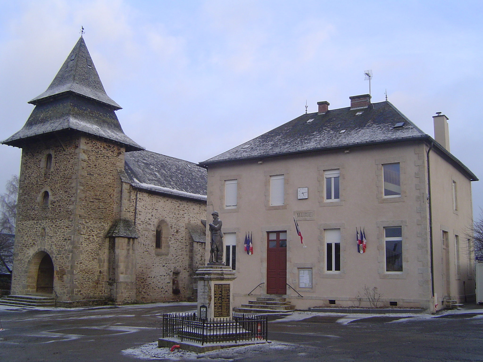 Vue de la mairie et de l'église de Saint-Jal